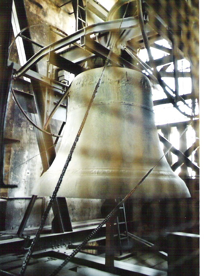 Glocke 2 der Dresdner Kreuzkirche